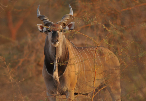 Antilopa Derbyho (Taurotragus derbianus derbianus)